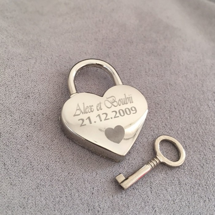 Un cadenas d'amour réalisé sur